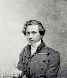 Eduard Gärtner: Selbstporträt von 1829